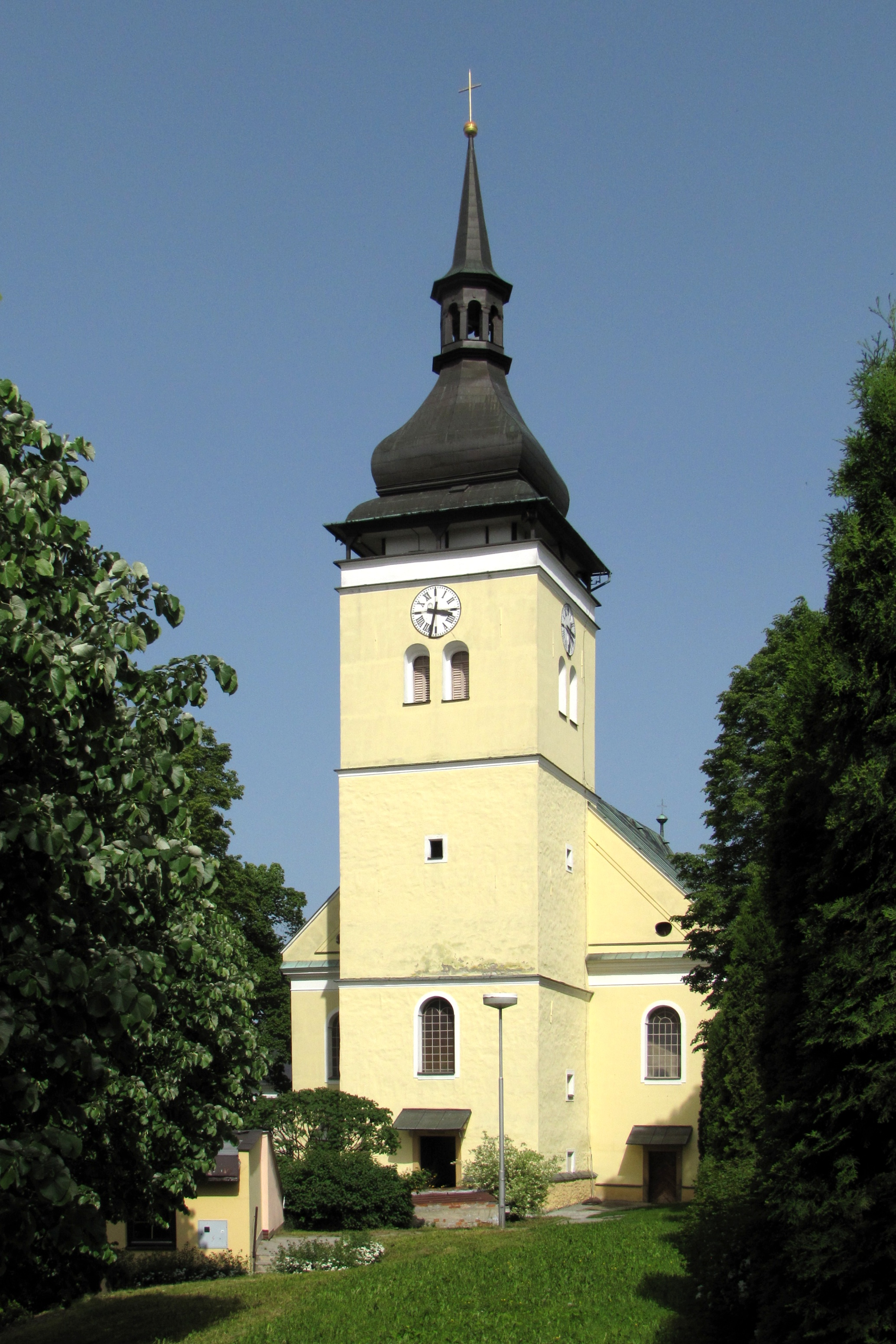 Česky: Kostel sv. Vavřince ve Vizovicích z roku 1792